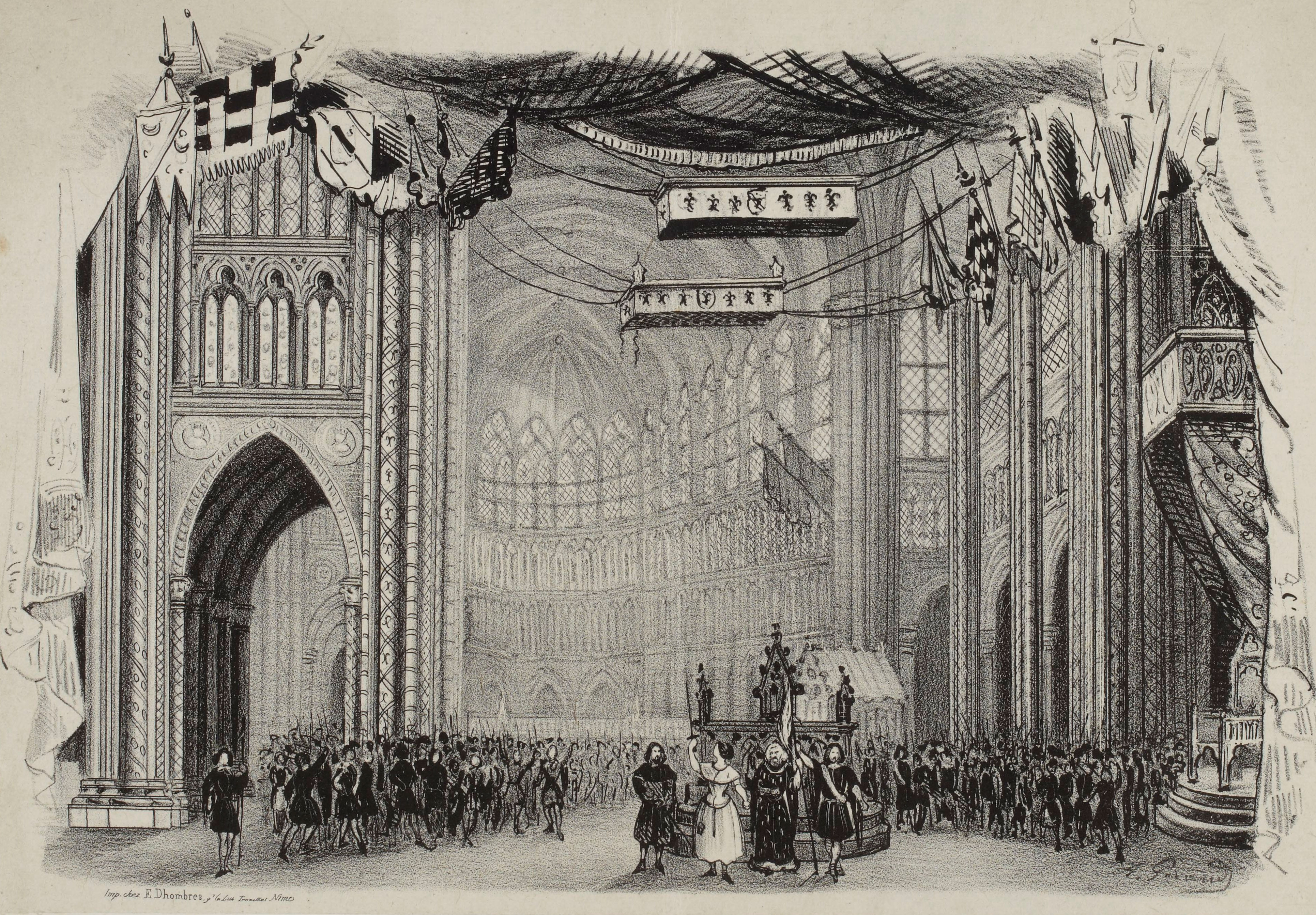 Dernier tableau du dernier acte de Charles VI, opéra de J.F. Halévy, représentant l'intérieur de la basilique de Saint-Denis